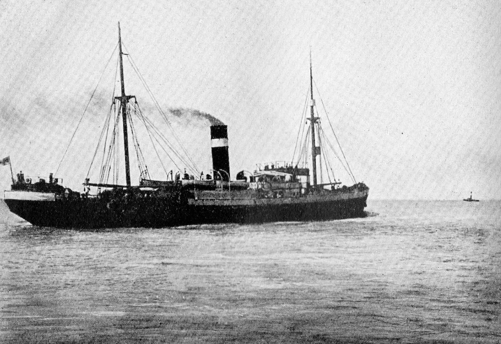 Hilfskreuzer METEOR